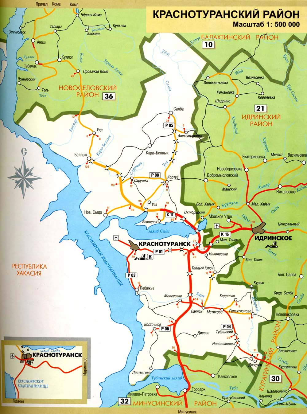 карта района